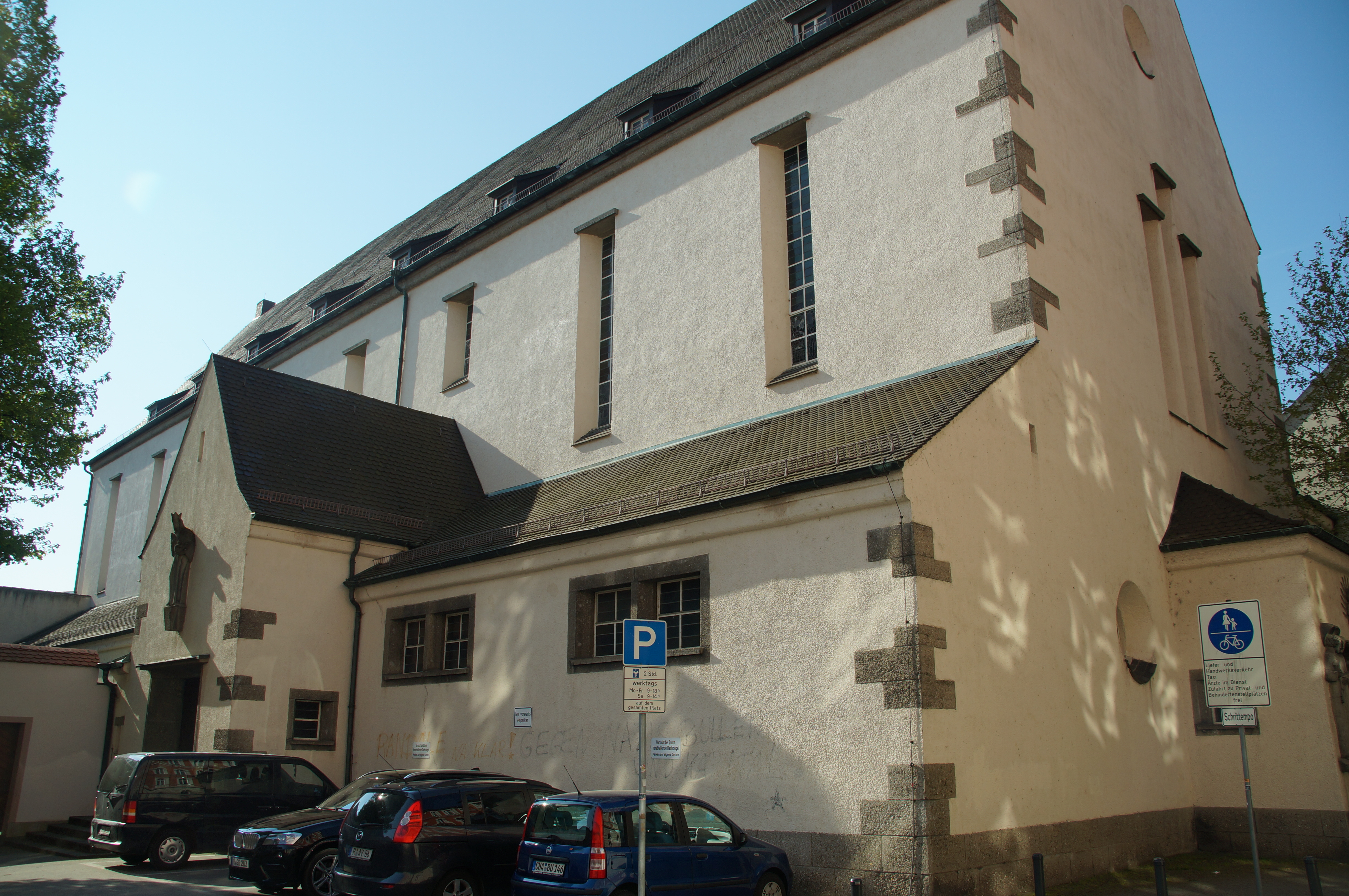 Kreuzgasse 20; Kath. Pfarrkirche Herz Jesu, dreischiffige Basilika mit Satteldach, eingezogenem Chor mit Walmdach und unvollendetem Südturm, verputzter Ziegelbau, Turm mit Hausteinverkleidung, spätexpressionistisch, 1928-30 von Carl Schad; mit Ausstattung.